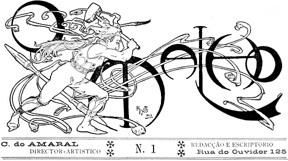 Cabeçalho da primeira edição de O Malho, 1902. Fonte